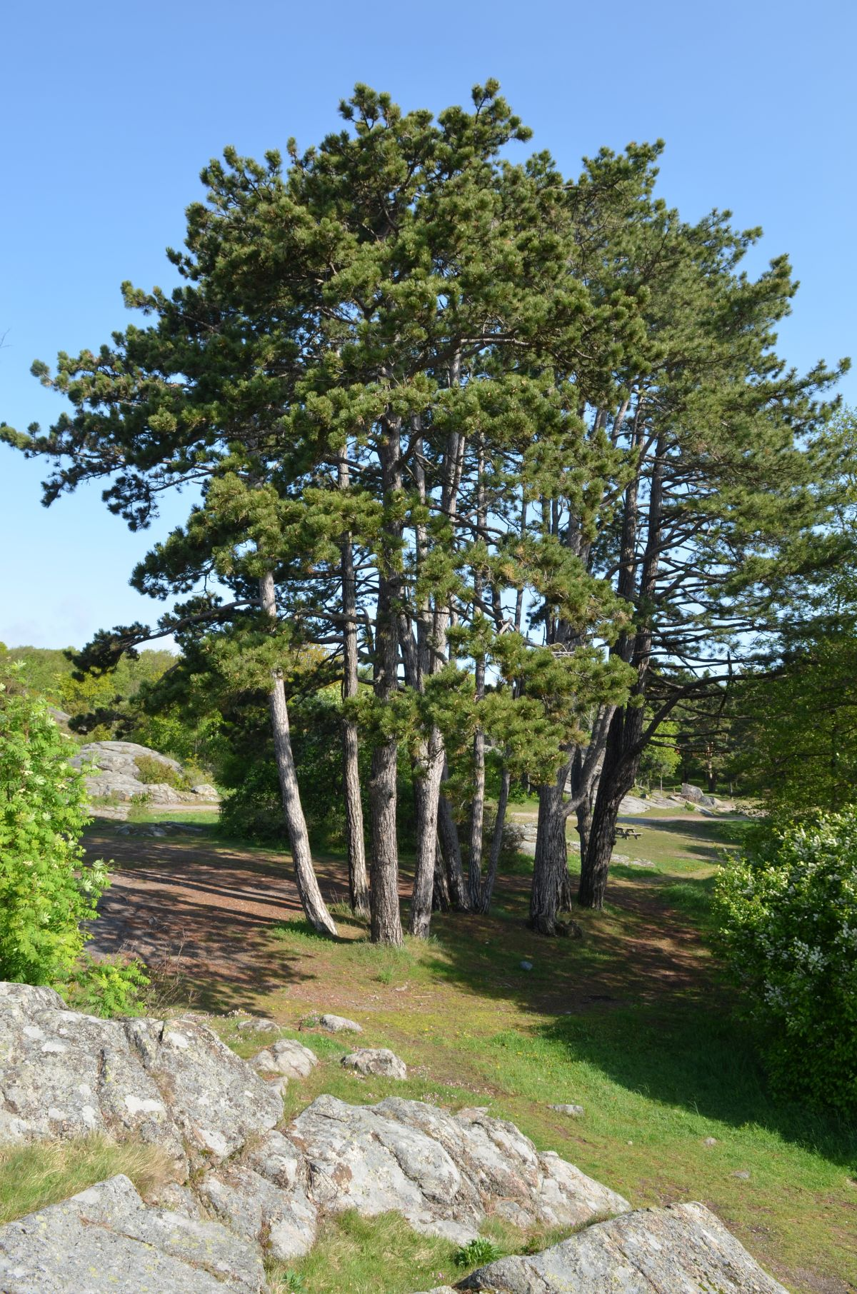 Svartfuruene i Skråvika er et fremmed treslag, med opprinnelse i Sør-Europa og Vest-Asia.